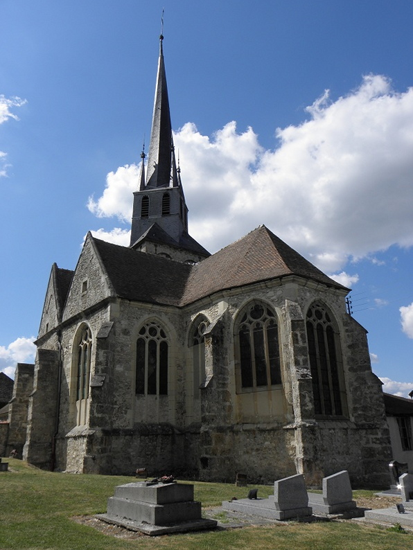 Chevet de l'église Saint-Rémi de Mareuil-le-Port (51).